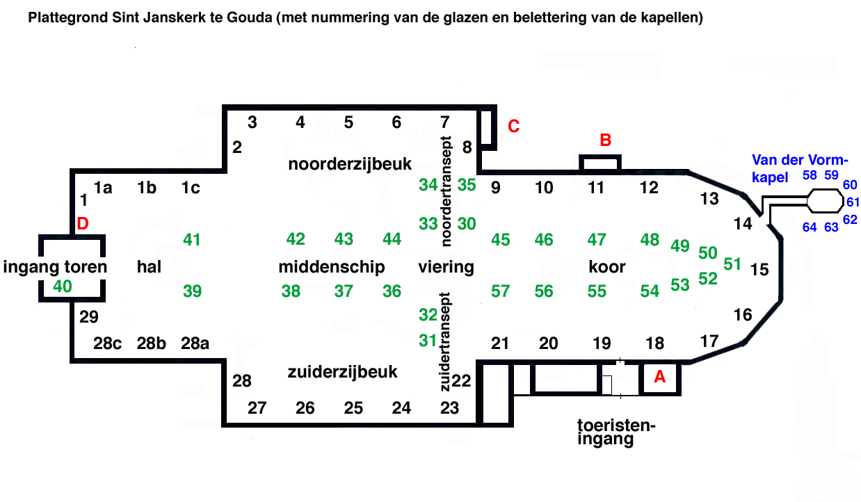 plattegrond Sint Janskerk te Gouda met glazenschema. A Is de van Beverninghkapel, B Is de Coolkapel. C Is de grafkapel van W. Meurs. D Is de grafkapel van Van der Dussen.